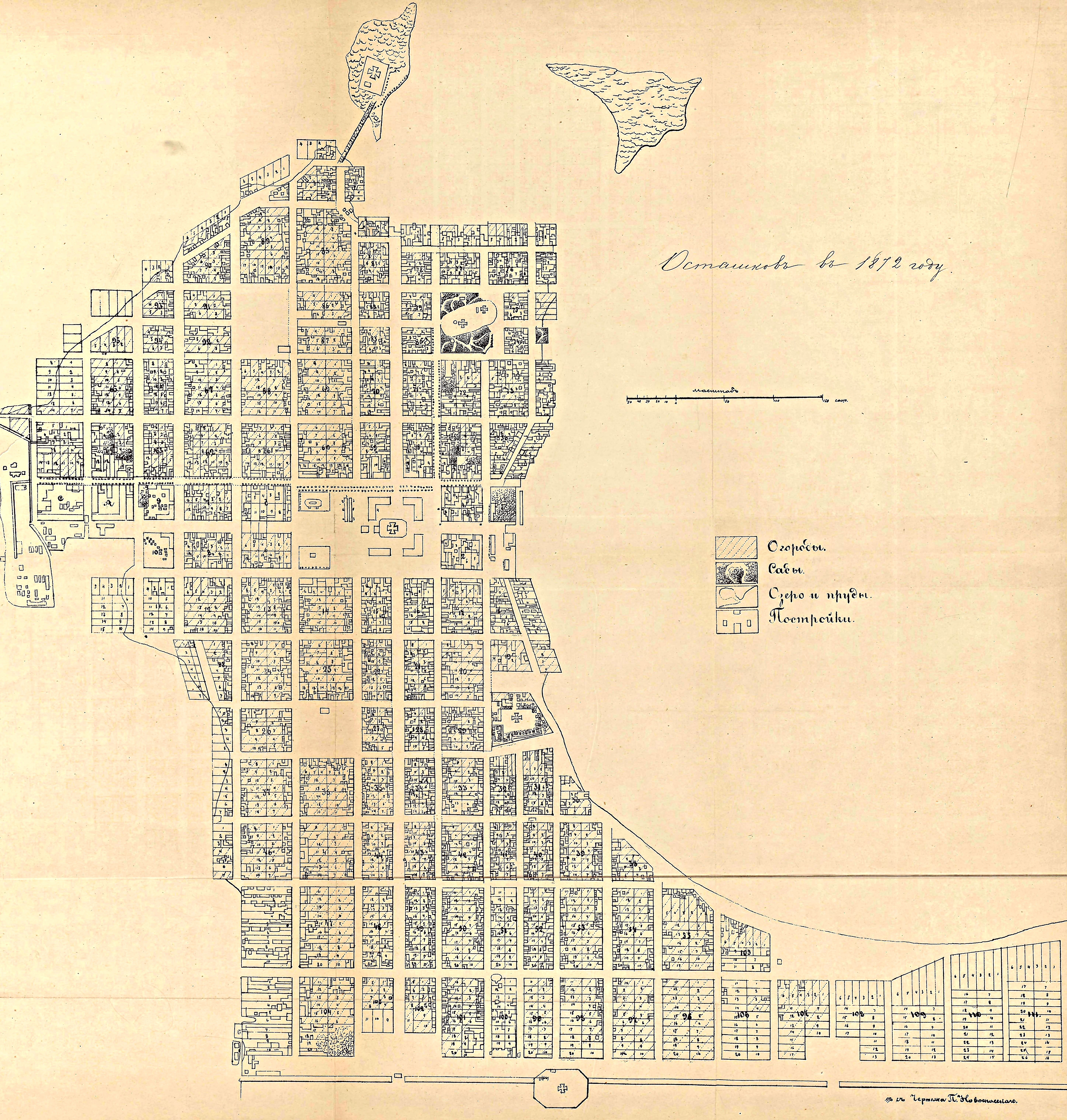 План Осташкова в 1872 году с чертежа П. Новоспасского. "Историко-статистическое описание города Осташкова"/Сост. и предисл. В.И. Покровского - Тверь:тип. Губ. зем. управы, 1880